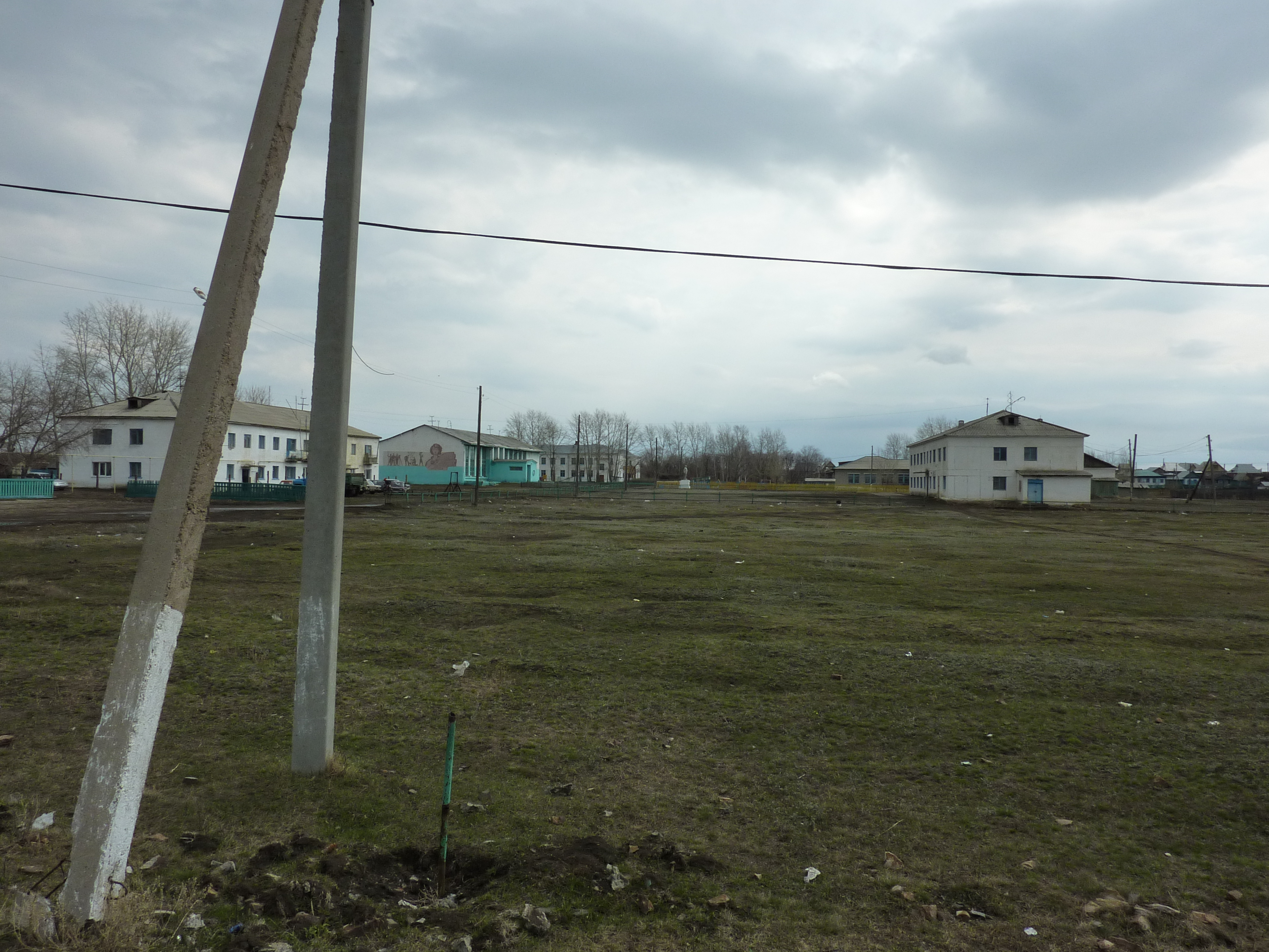 Houses in village Mikhailovka ((Abzelilovsky District, Bashkortostan) (Дома в Михайловке)